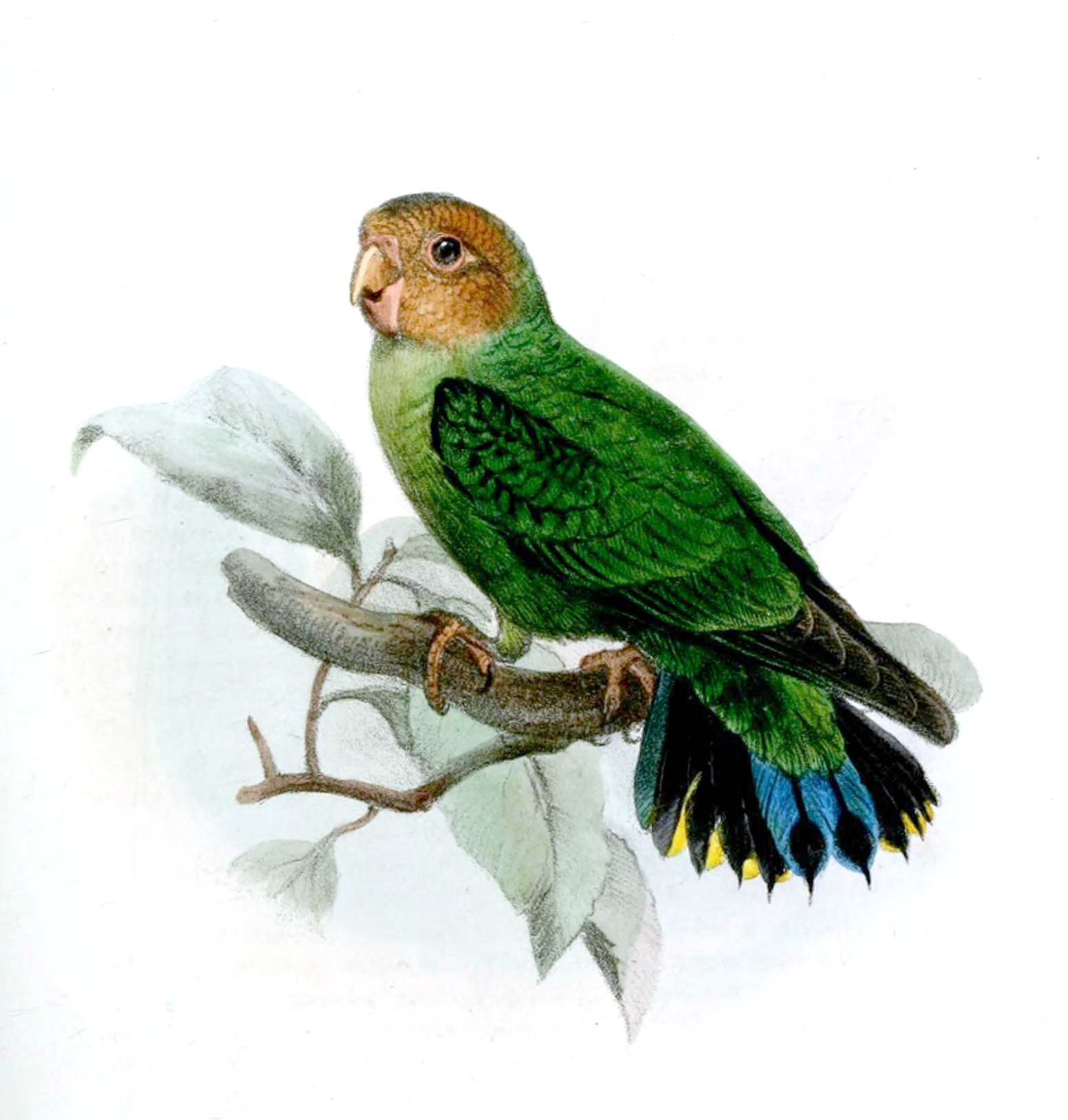 Nasiterna pusio = Micropsitta pusio